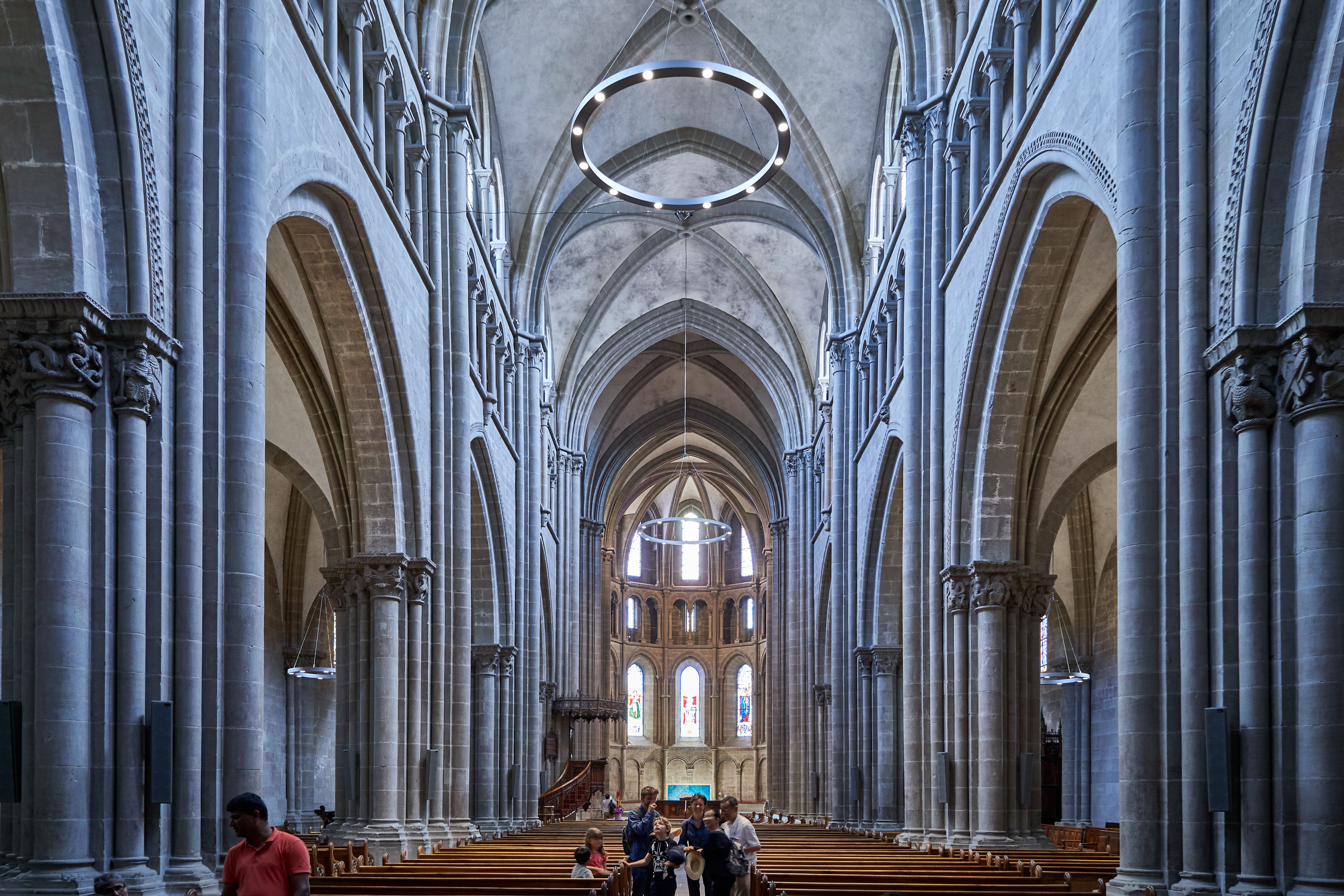 Genève - Cathédrale - Nef